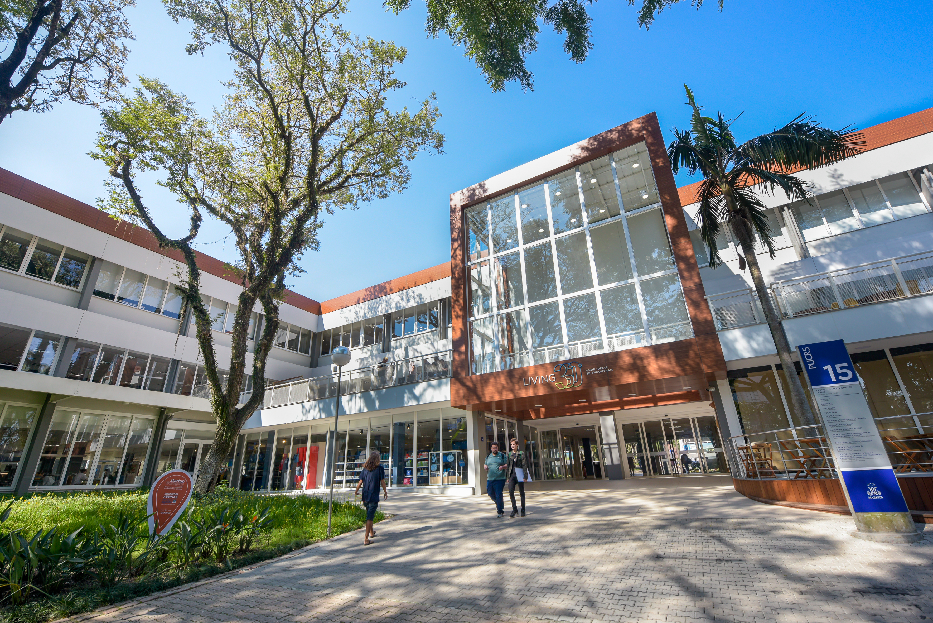 Fachada do Living 360º